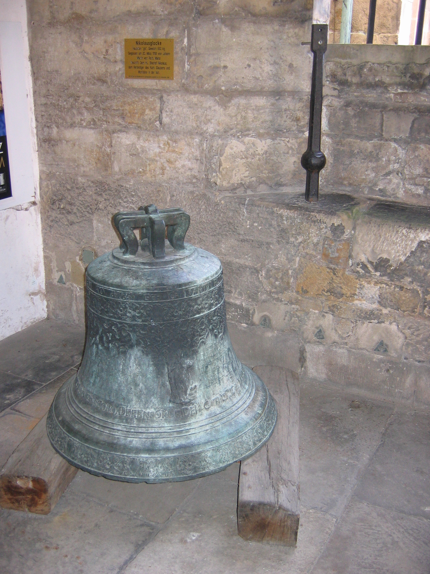 Abgestellte Nikolausglocke im Nordparadies des Hildesheimer Domes.